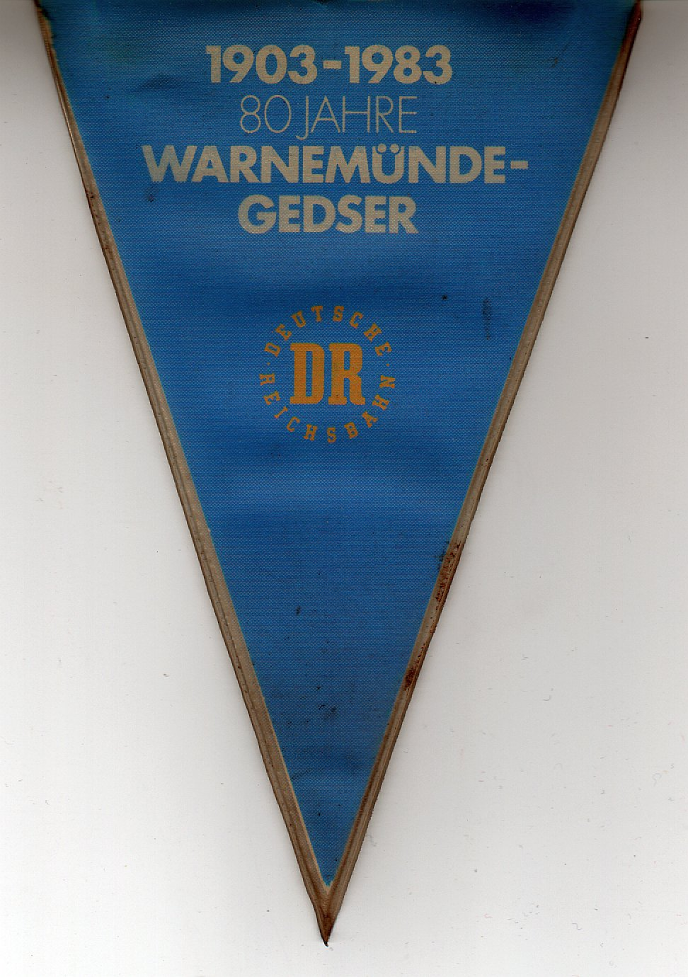 1983 in West-Berlin verteilt